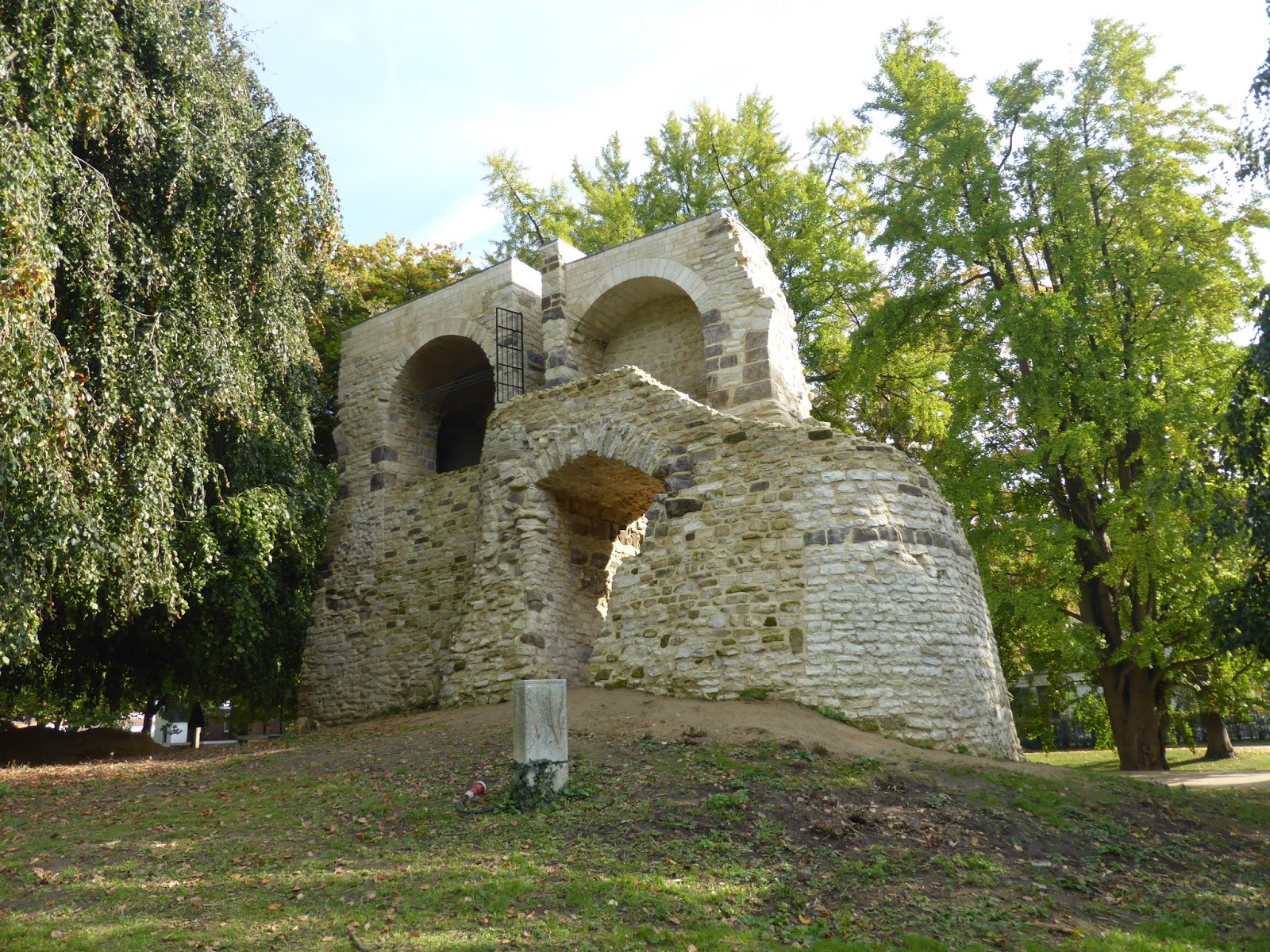 Vernieuwe stadsmuur Leuven